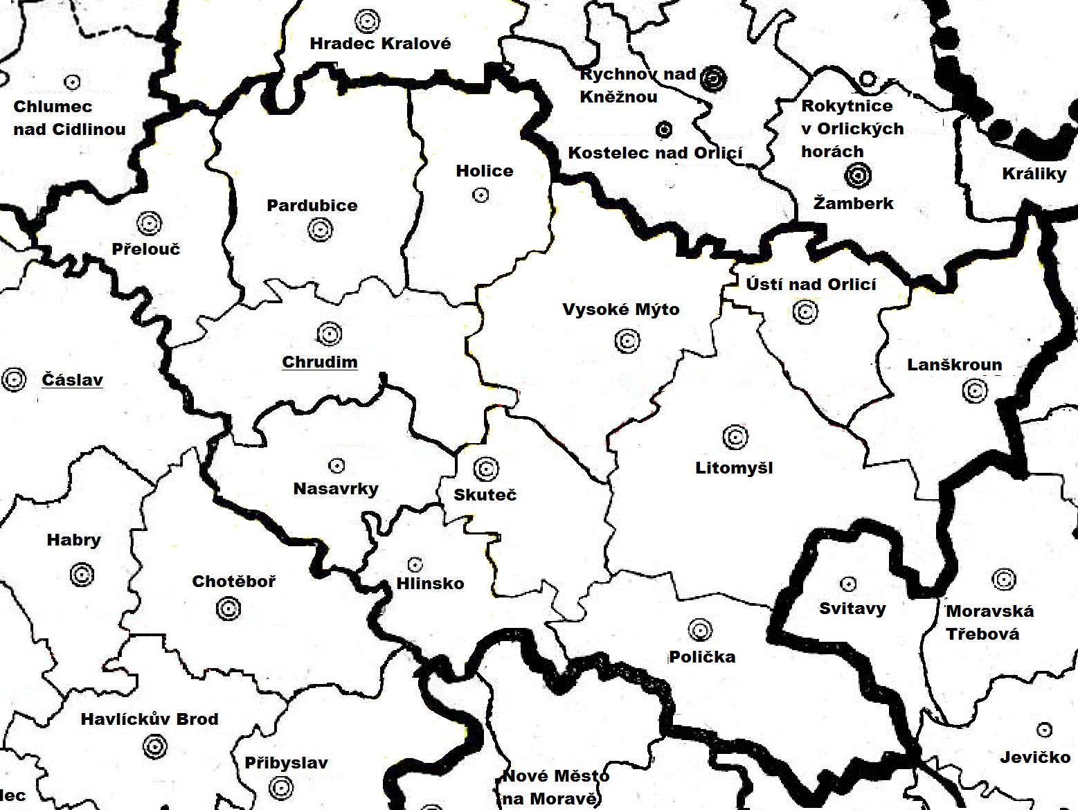 Soudní okresy Chrudimského kraje od r. 1855